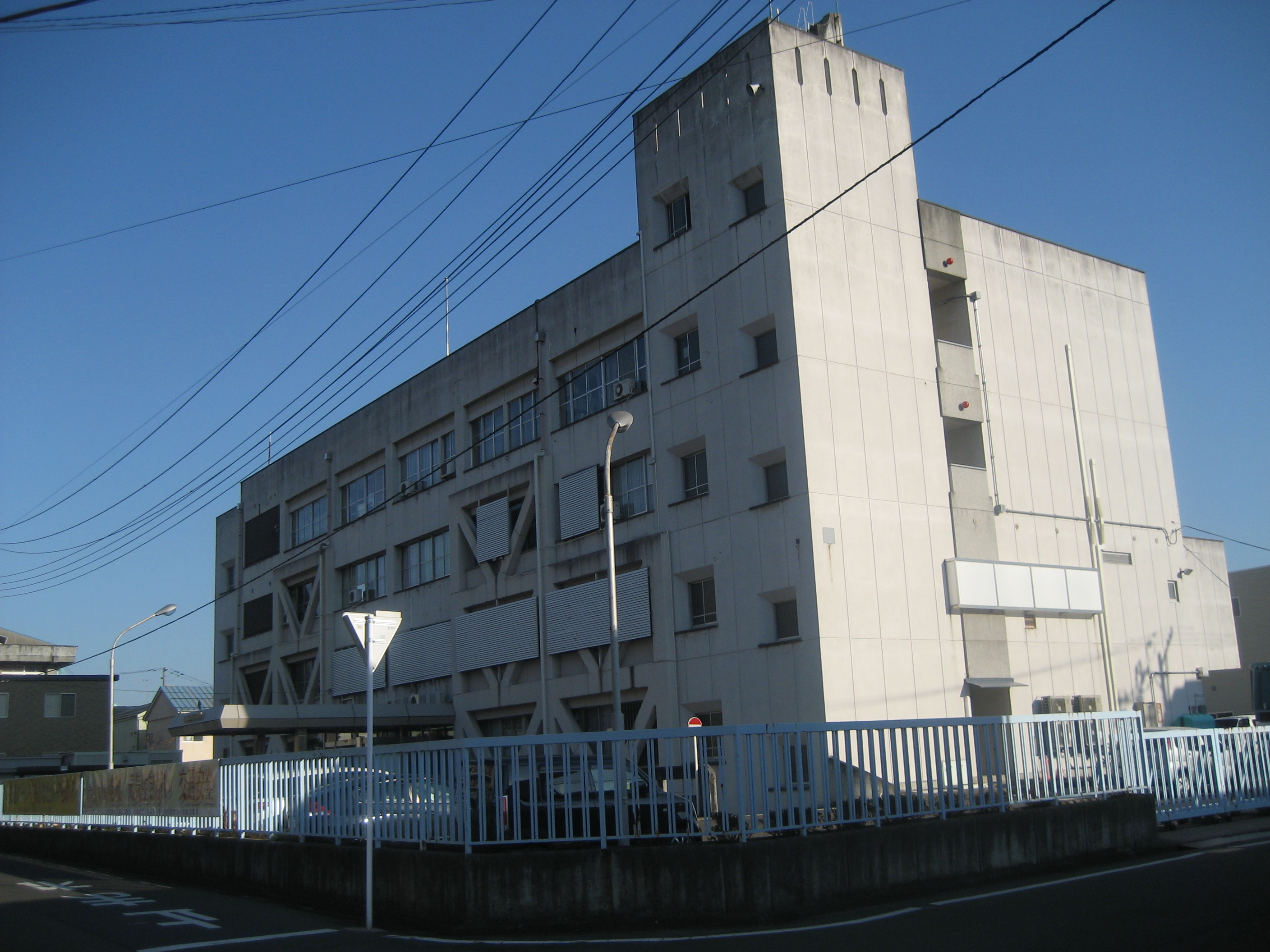 宮城県警察塩釜警察署庁舎